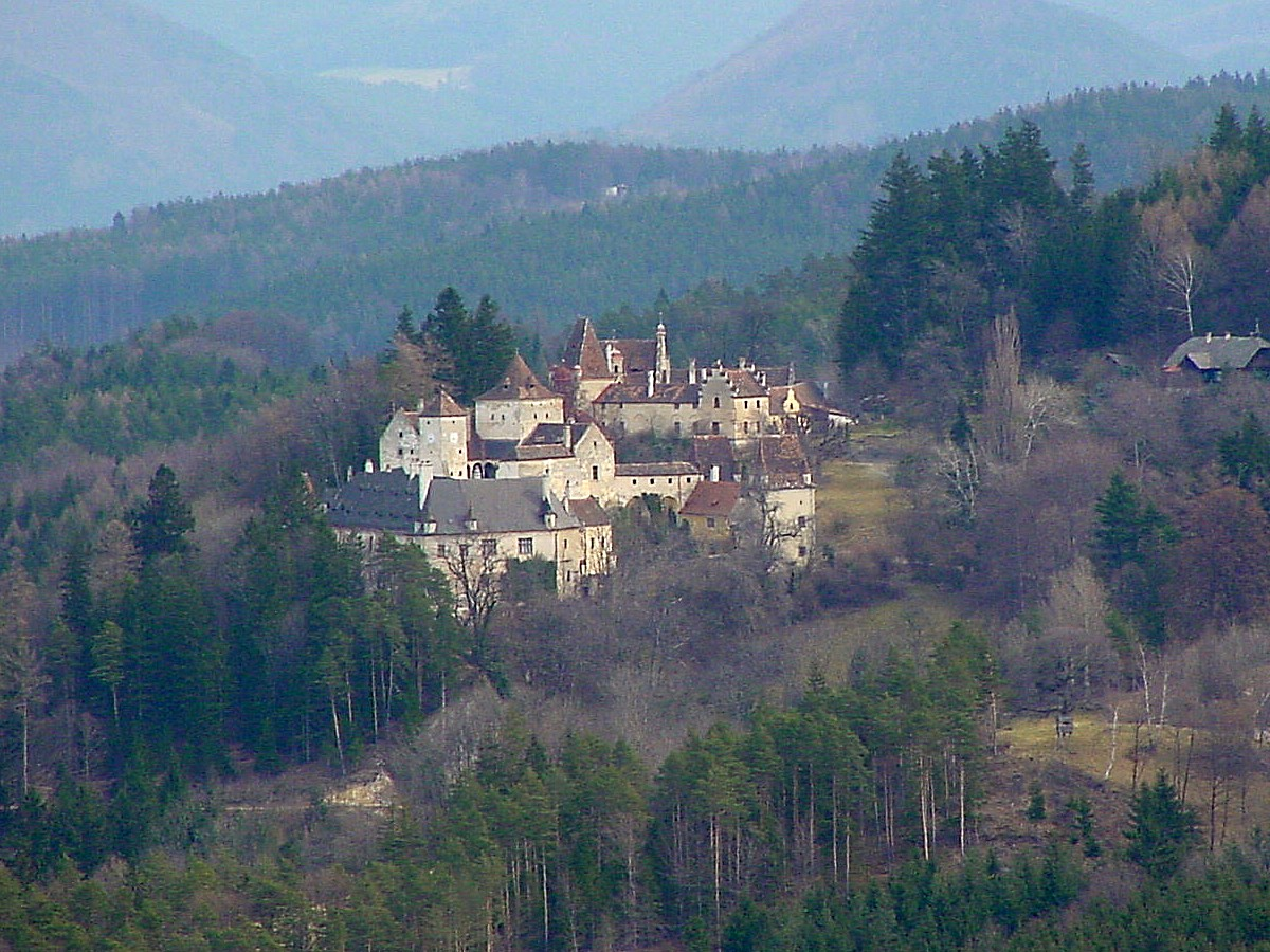 Burg Steyersberg Gemeinde Warth (Niederösterreich)